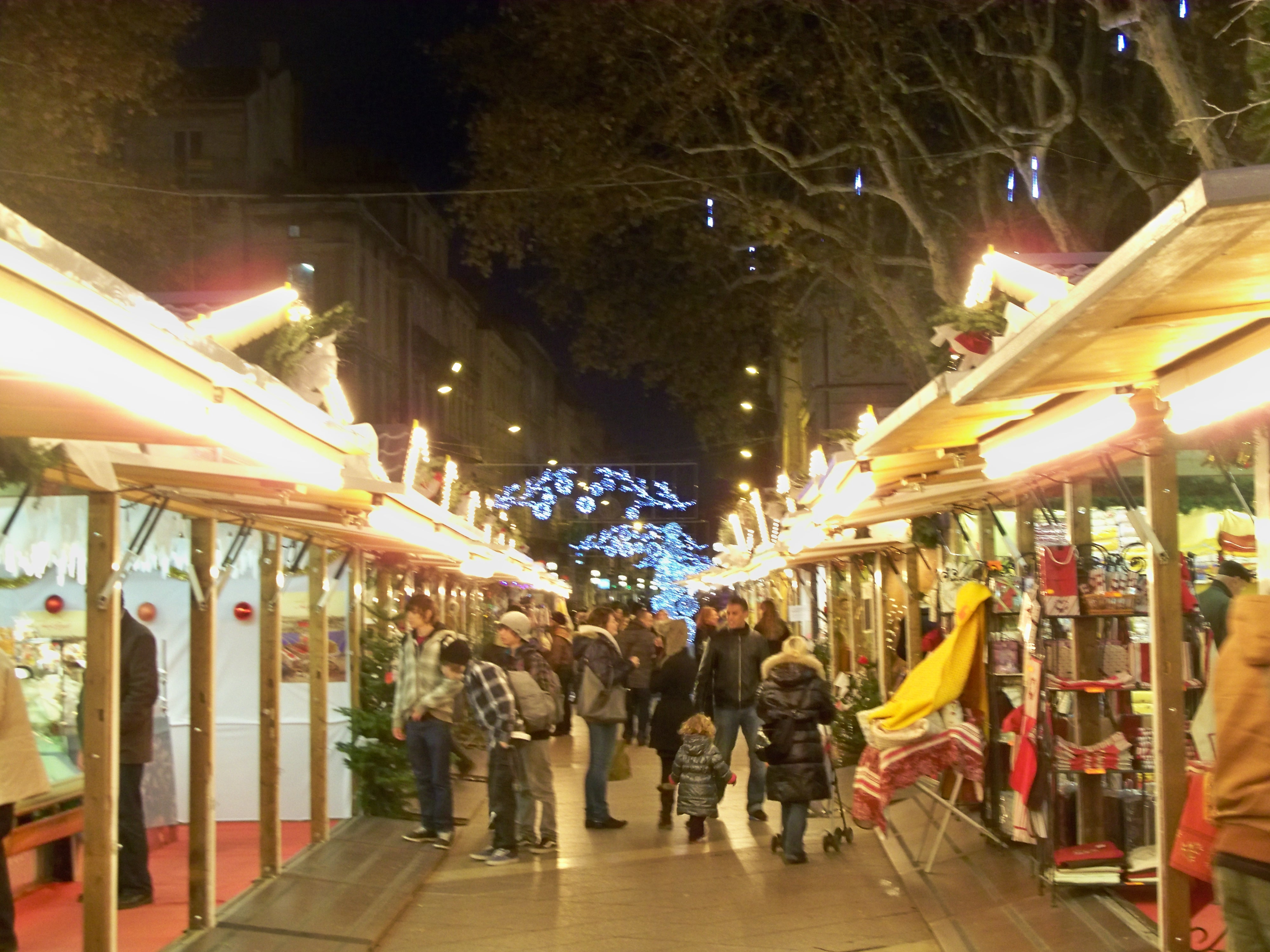 Marché de Noël d'Avignon, Vaucluse, France